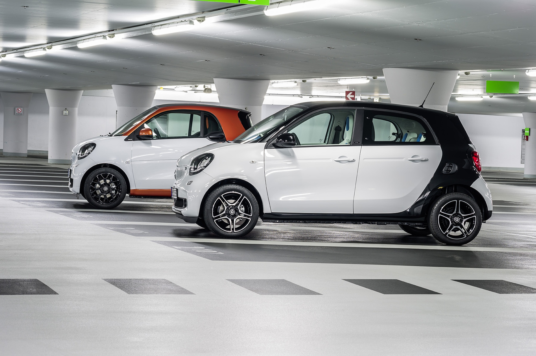 Pressefotos von Smart